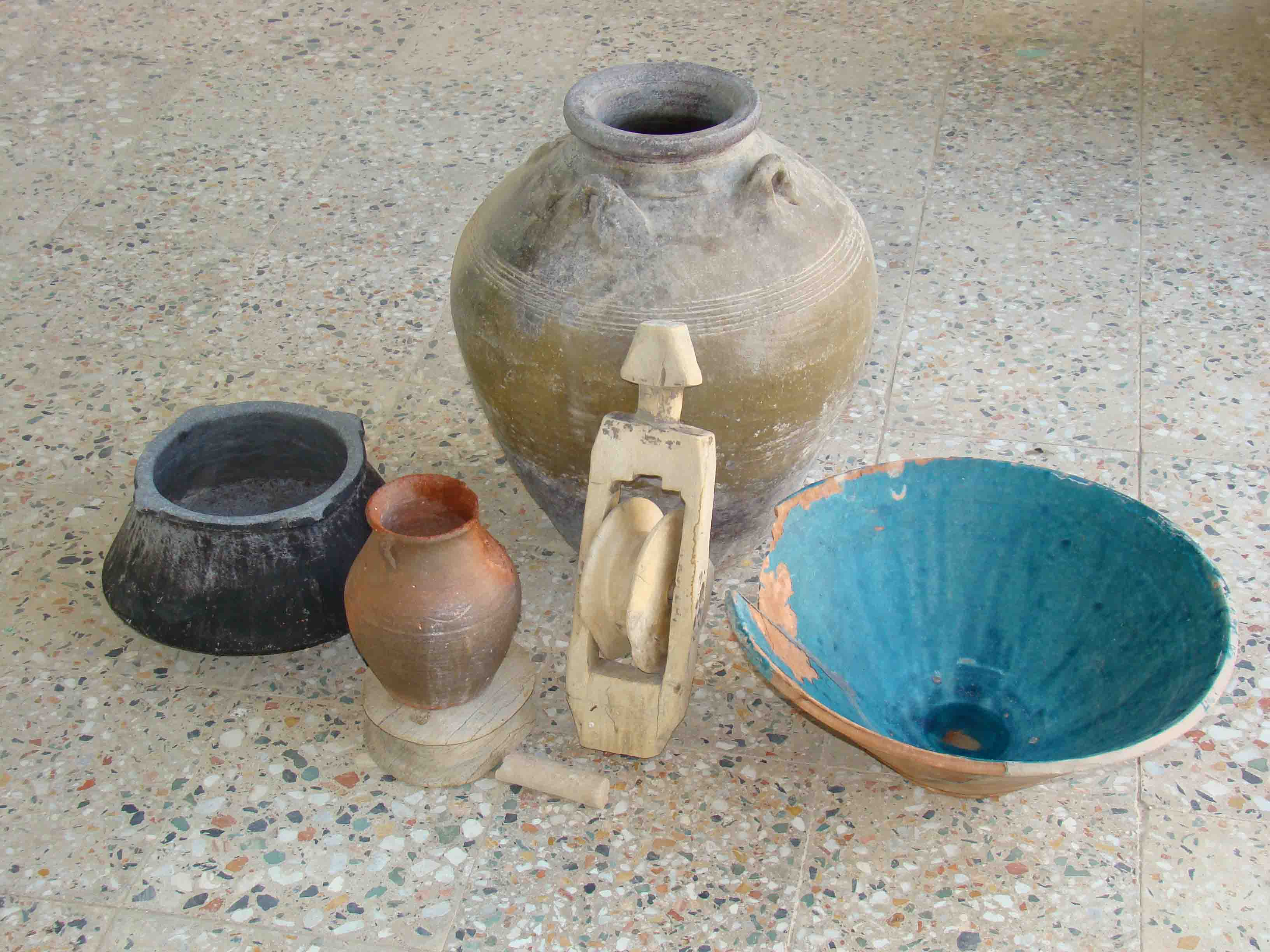 موزه شخصی کرامت اله تقوي